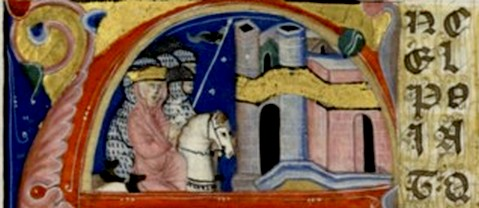 Arrivée d'Alix de Chypre à Acre